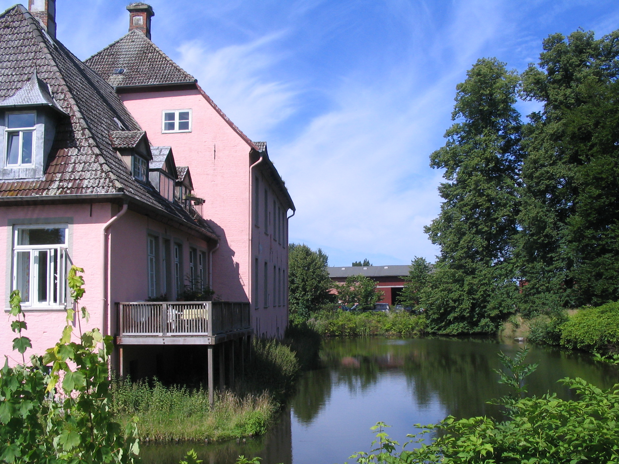 Dammgut in Ritterhude, Niedersachsen.